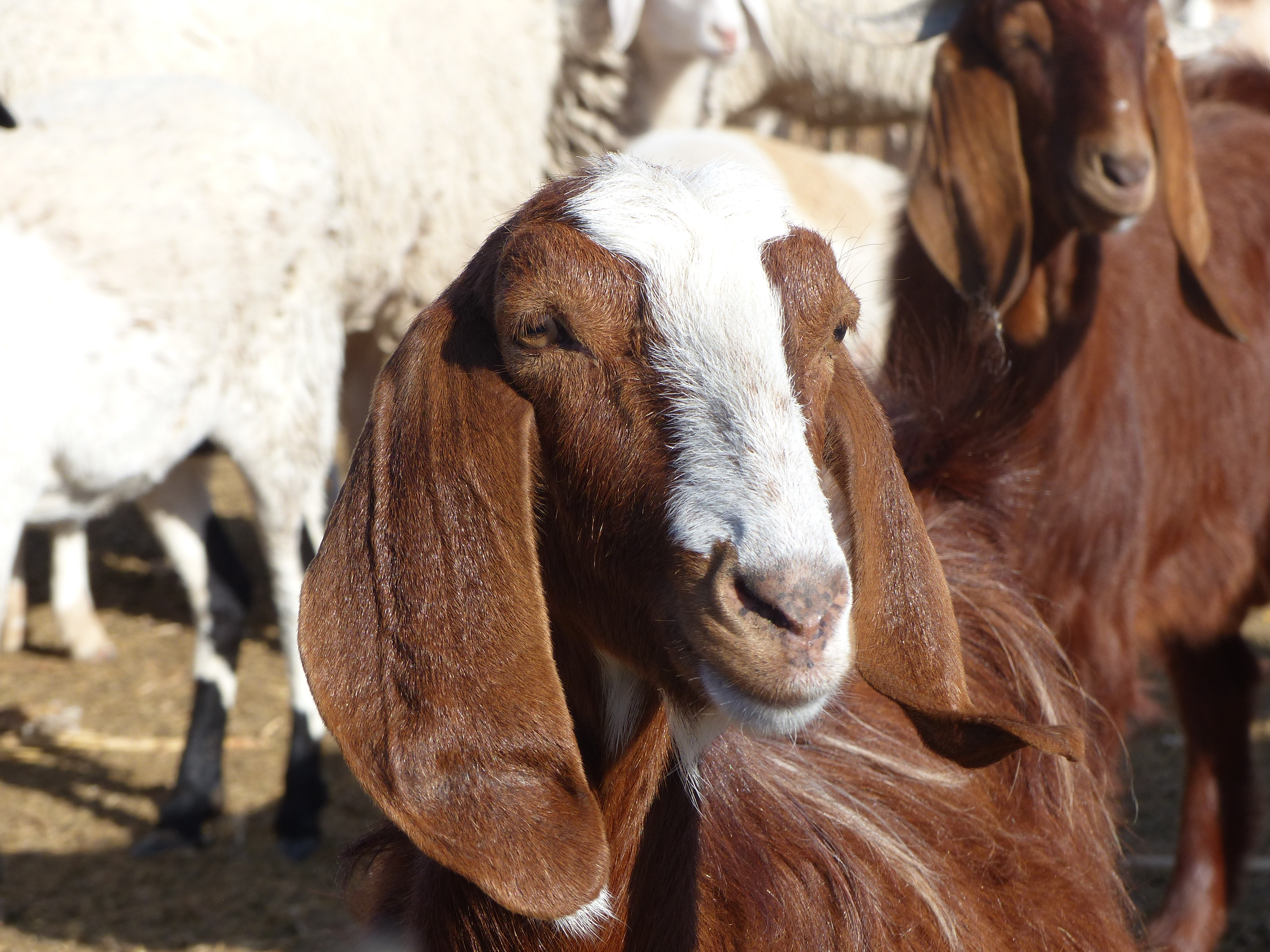 Chèvre élevée dans le désert aux environs de Tozeur, Tunisie